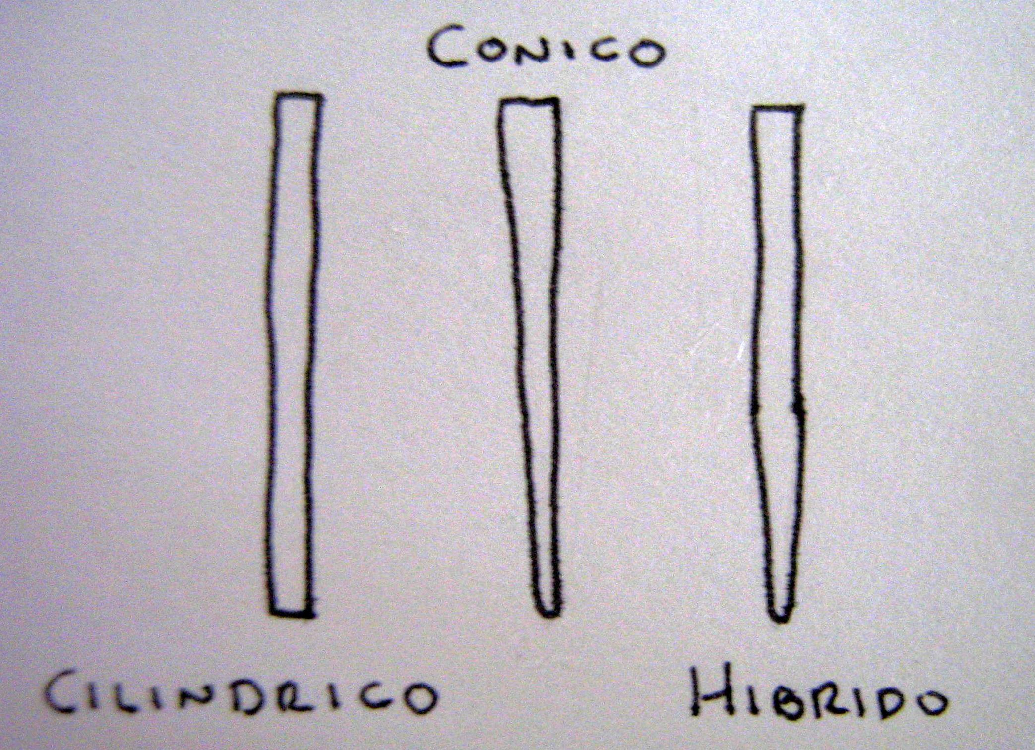 Nucleos prefabricados según su forma.